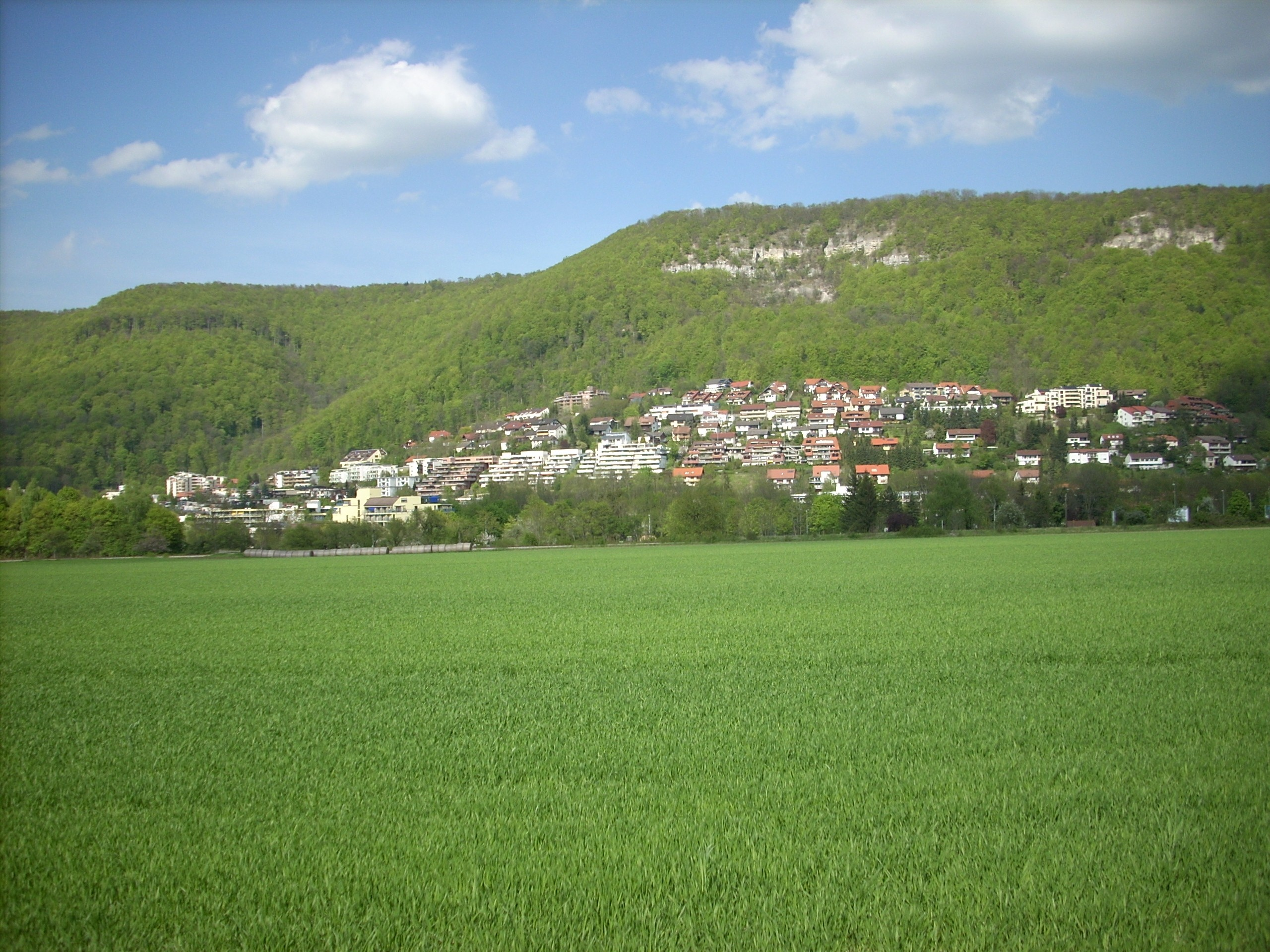 Nordende von Bad Urach